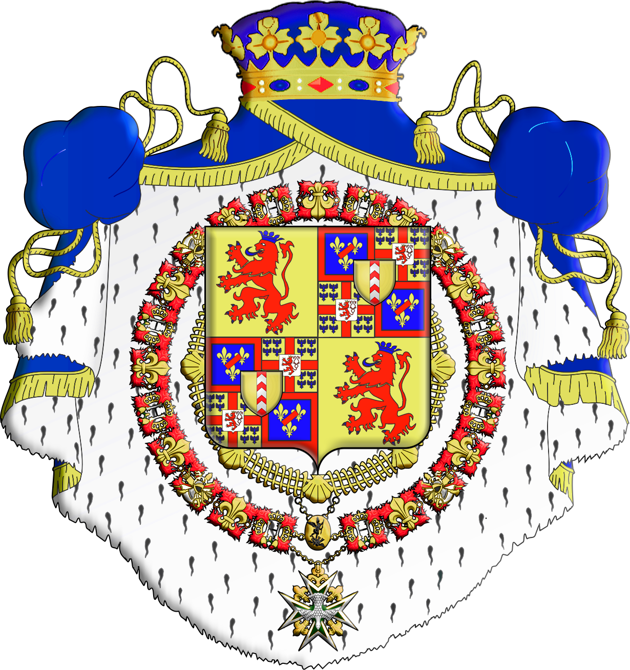 Armes des 5e et 6e ducs de Luynes : Écartelé : aux 1 et 4, d'Albert; aux 2 et 3, contre-écartelé : a) et d) de Bourbon-Soissons, b) et c) de Montmorency, sur le tout des quartiers 2 et 3, de Neufchâtel. (avec un dessin de Jimmy44)